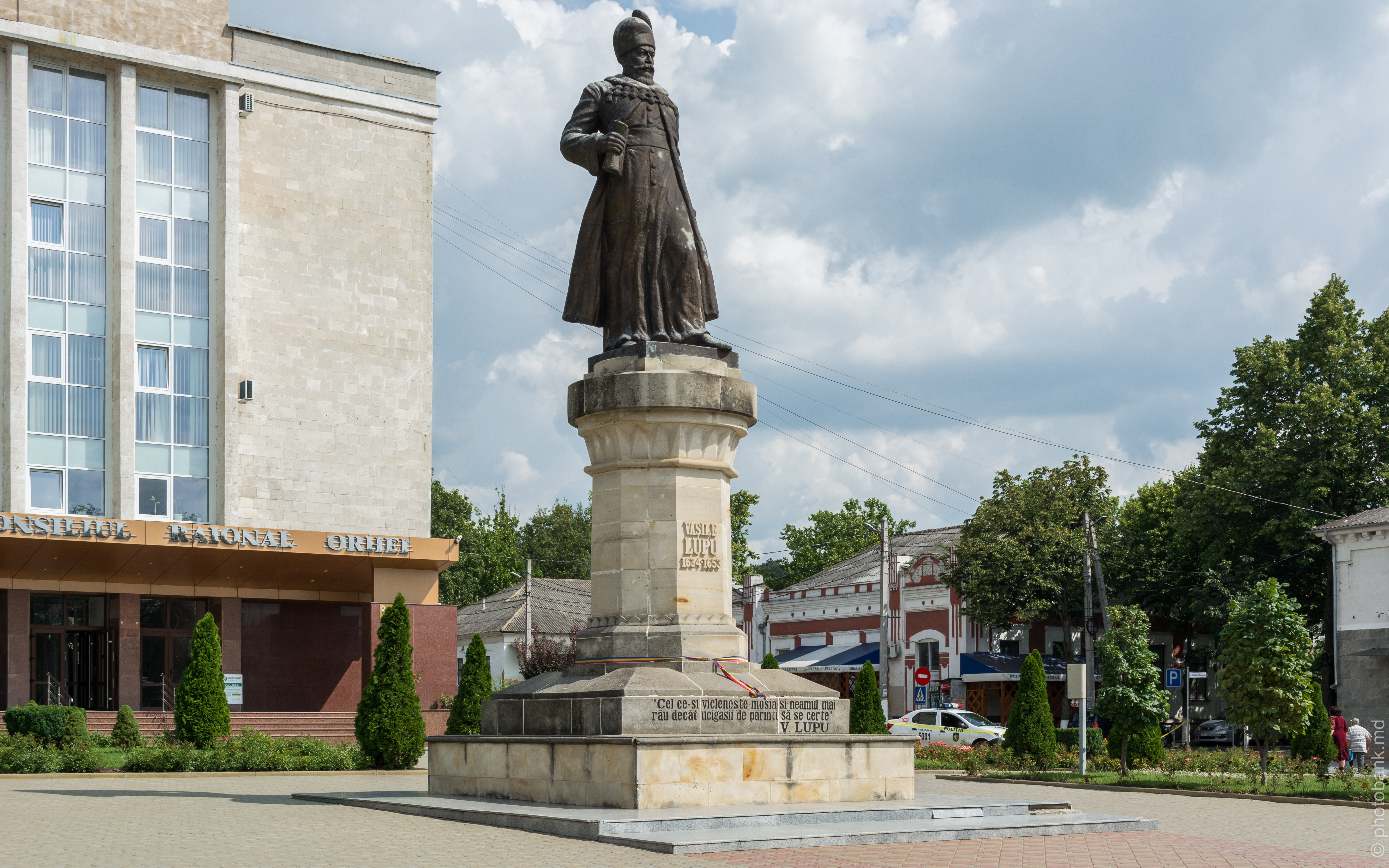 Оргеев, памятник Василию Лупу / Monumentul lui Vasile Lupu din Orhei / Vasile Lupu monument in Orhei